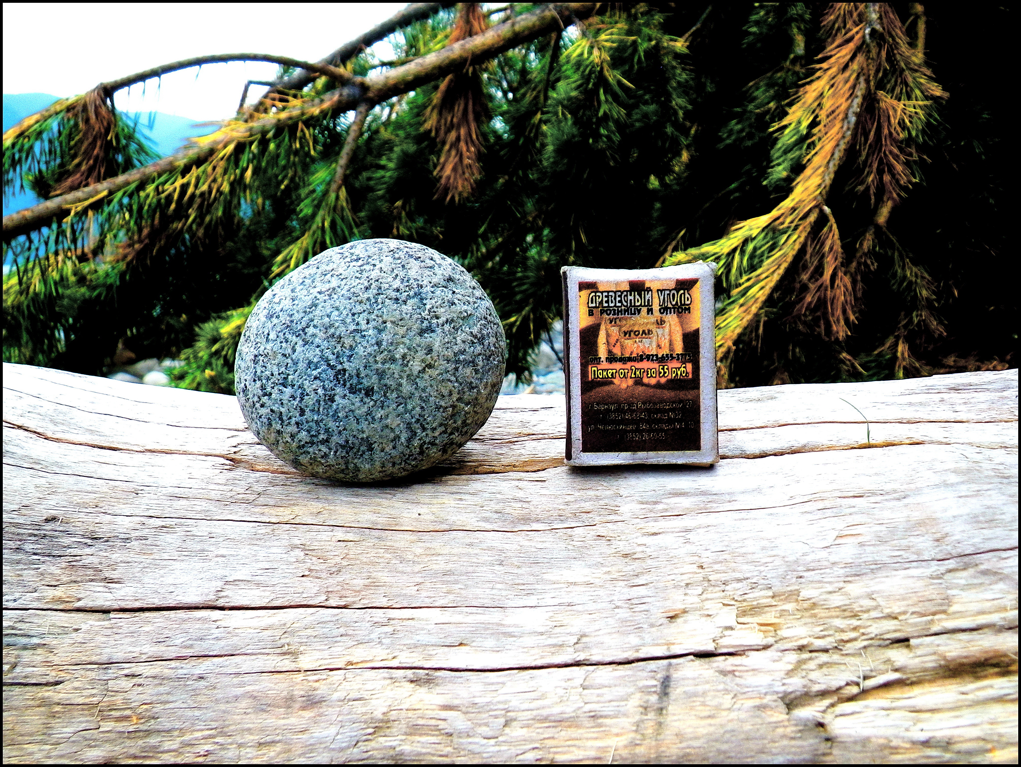 Совершенно окатанная крупная гранитоидная галька из береговой полосы. Teletskoye Lake, Altay. Picture by Alexei Rudoy